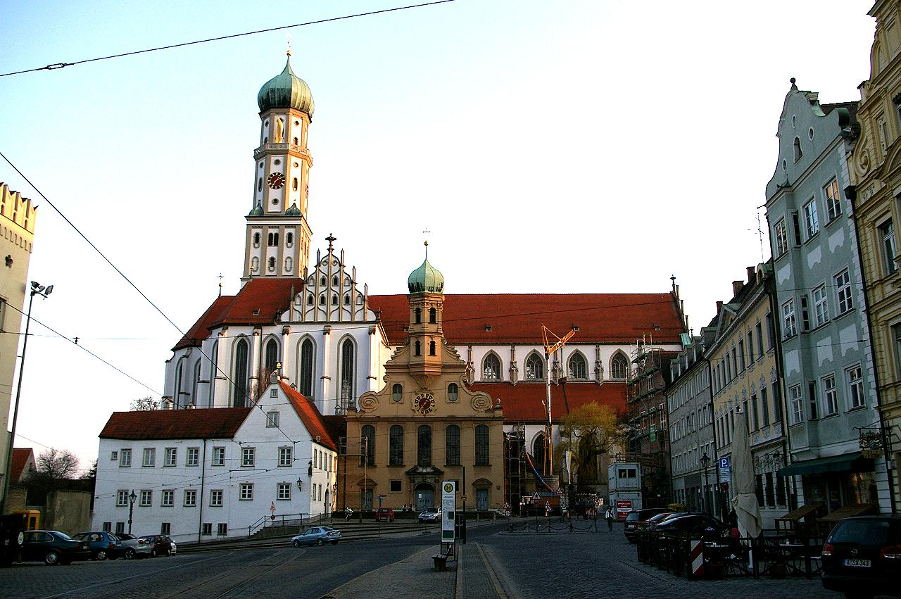 Augsburg - die evangelische Ulrichskirche (ockerfarben) und dahinter quer die katholische Kirche St. Ulrich und Afra von Norden (Maximilianstrasse)